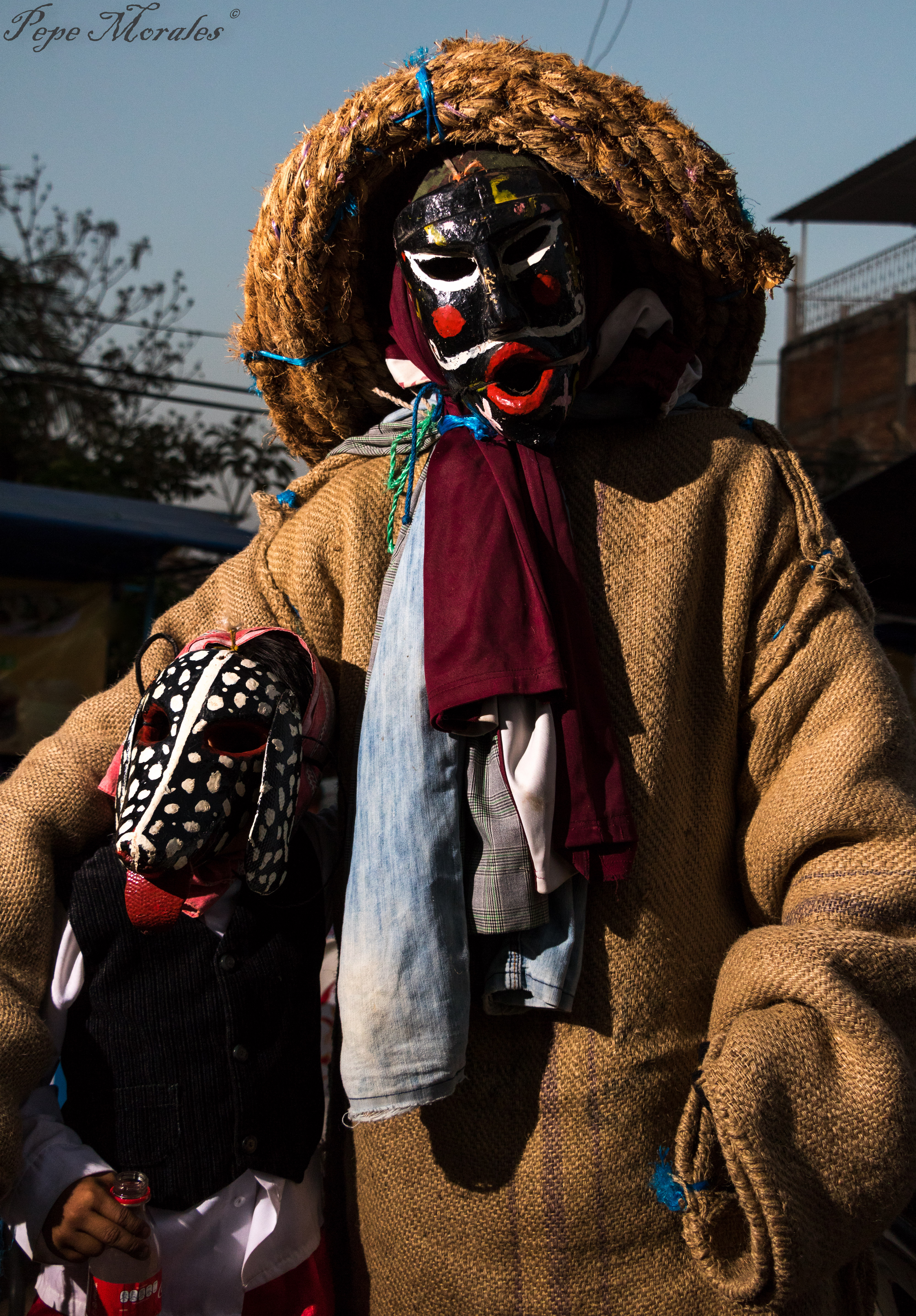 Danzante Tlacolorero con su hijo danzante.